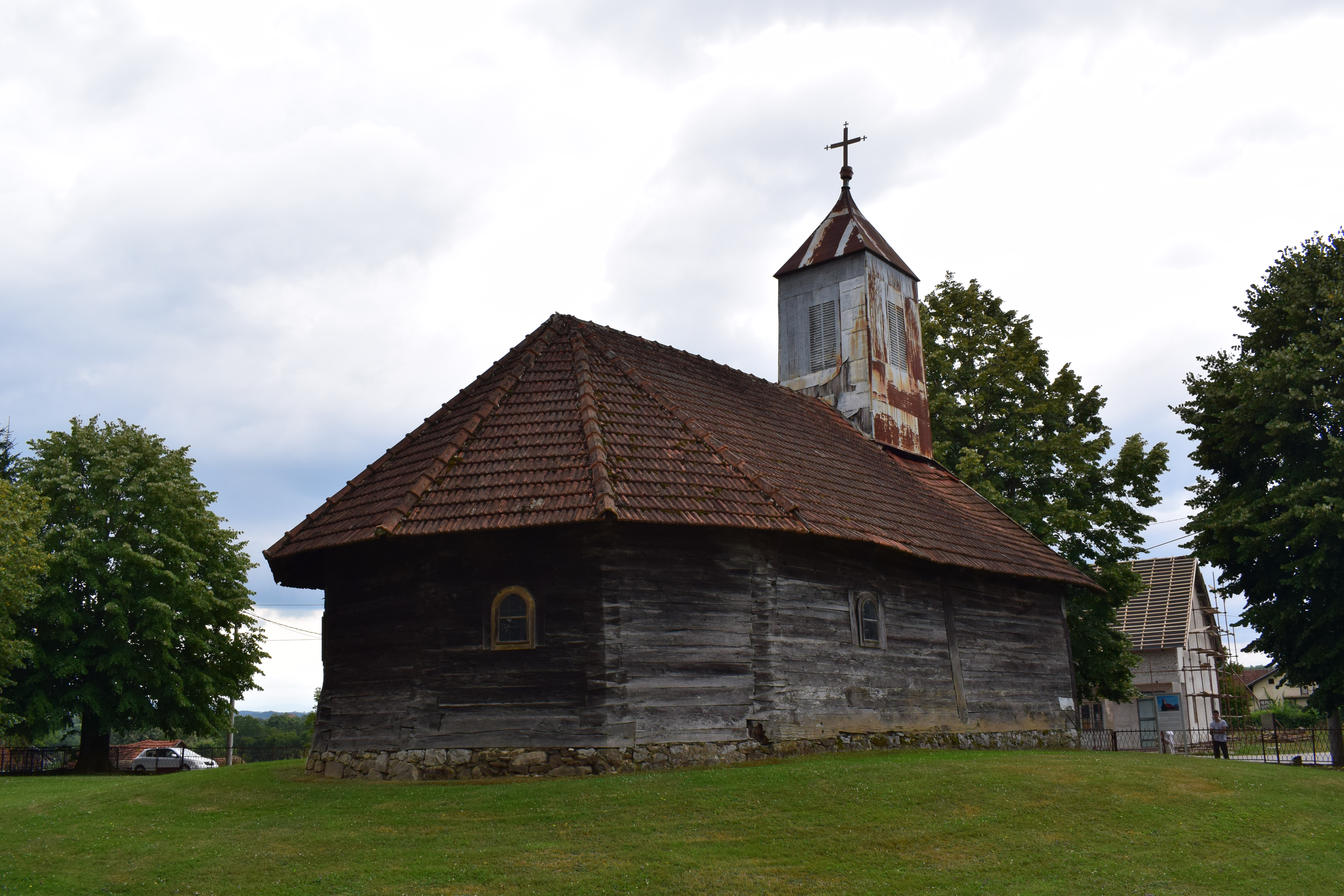 Црква Вазнесења Господа Исуса Христа у Ракелићима изграђена је на мјесту које се некад звало Збориште. Прије ње на овом мјесту била је мања црква-чарда са околним гробљем, срушена у првој половини 19. вијека. Црква је, након дуго година градње изграђена и освештана 1856. године, а посвећена је Светом Вазнесењу Господњем. Саградили су је мајстори из Приједора, о чему говори урезана година 1856. и инцијали М.Ч. на средњим брвнима. Данашња црква брвнара, за разлику од првобитне из средине 19. вијека, има темељни зид висок око пола метра. Постоје два улаза у цркву, један на јужној, а други, главни, на западној страни. Иконостас је из времена подизања цркве са иконома које су радили мастори из Костајнице. У цркви се налази неколико црквених реликвија из Јерусалима међу којима се истиче Јерусалимска икона. Поред старе цркве брвнаре у Ракелићима је 1986. године подигнута нова црква посвећена Светој Тројици.